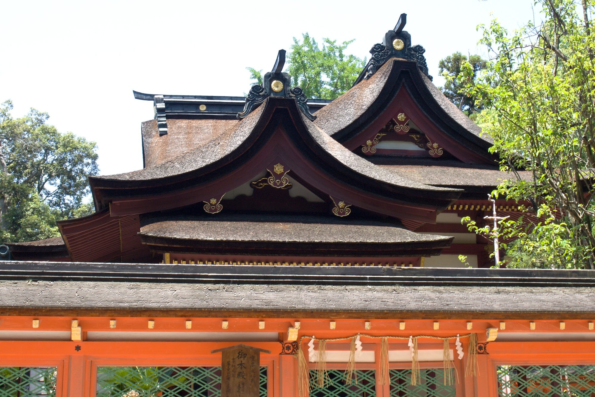 福岡市東区にある香椎宮の本殿